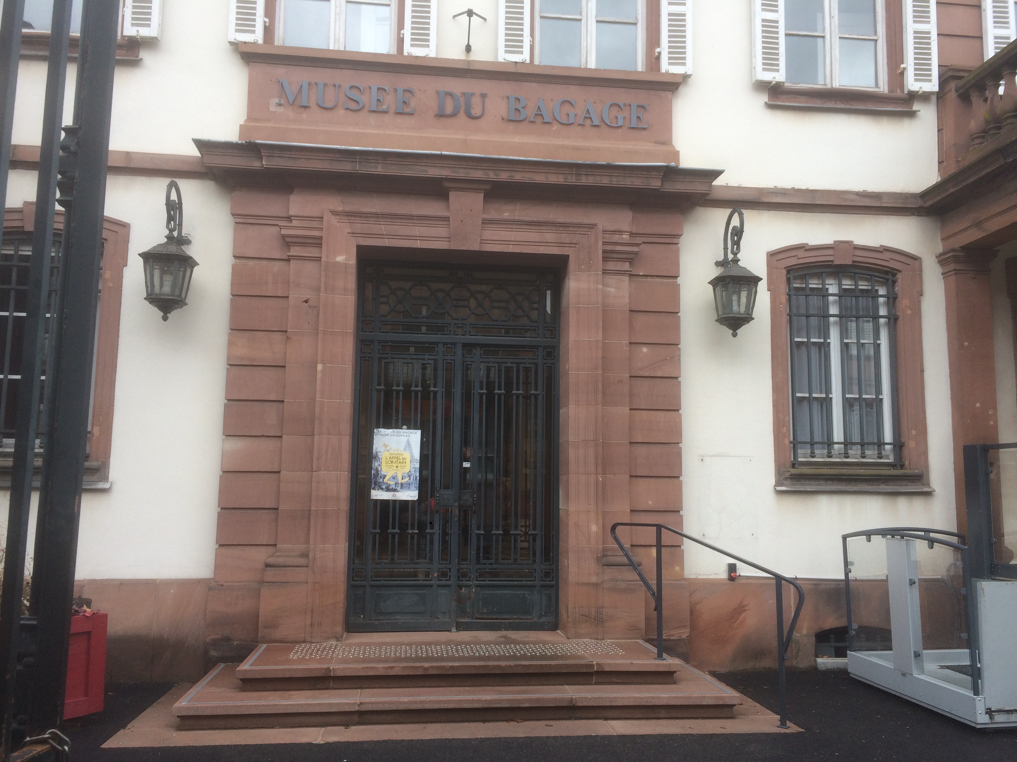 Entrée du Musée du bagage